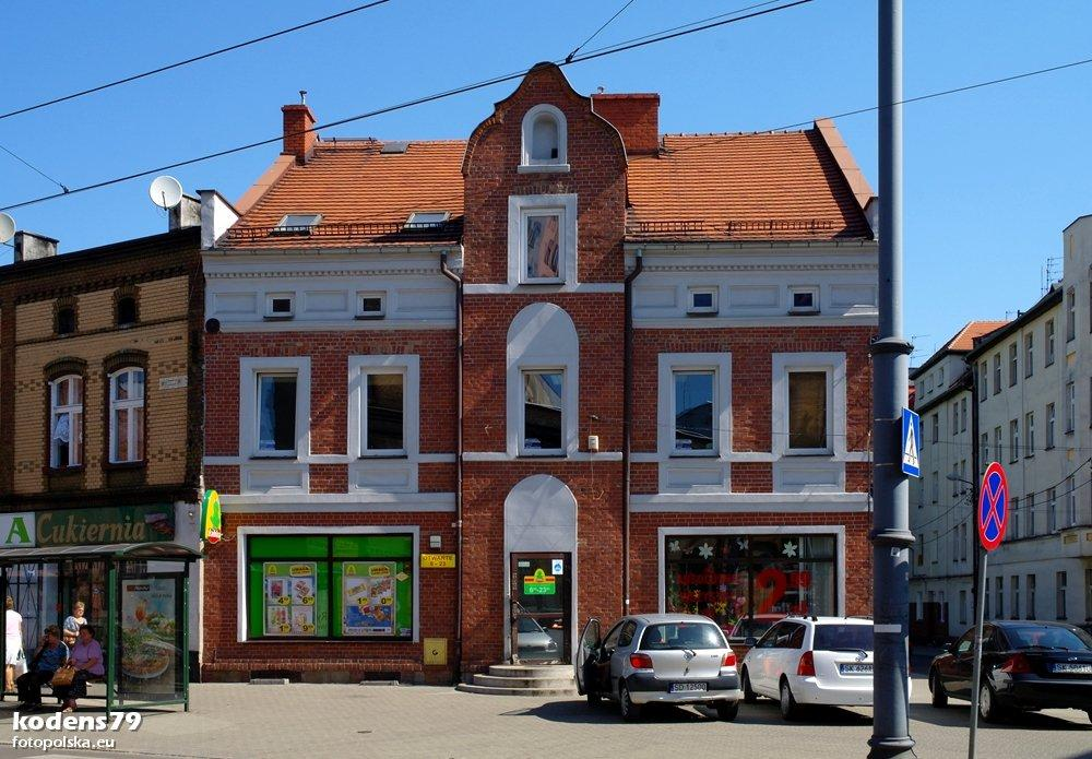 Gliwicka 117